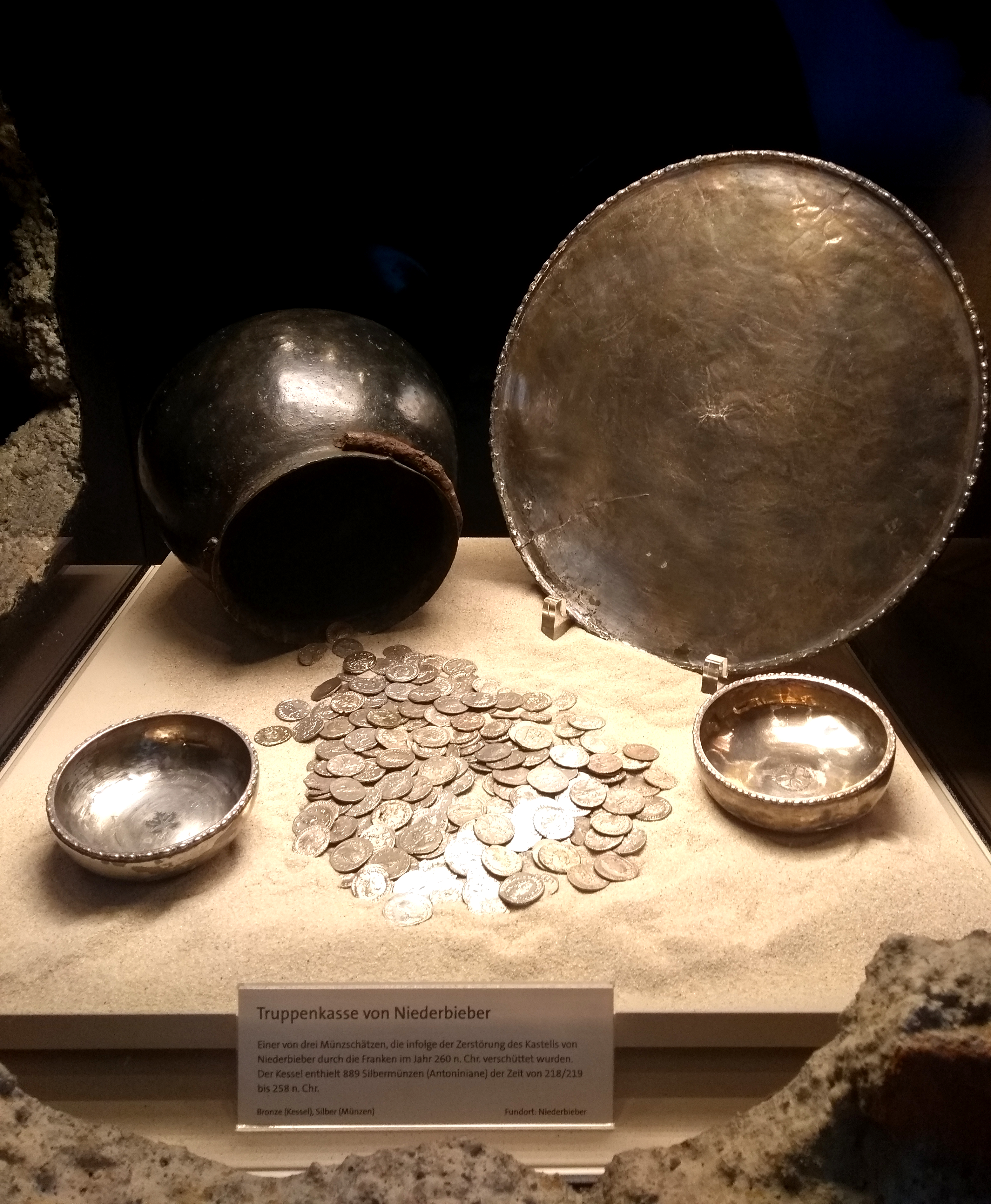 Museale Präsentation eines der drei Münzschätze von Niederbieber im Rheinischen Landesmuseum Bonn: Der Kessel erhielt 889 Antoniniane von 218-219 bis 258 n. Chr.